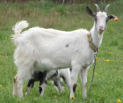 Capra hircus